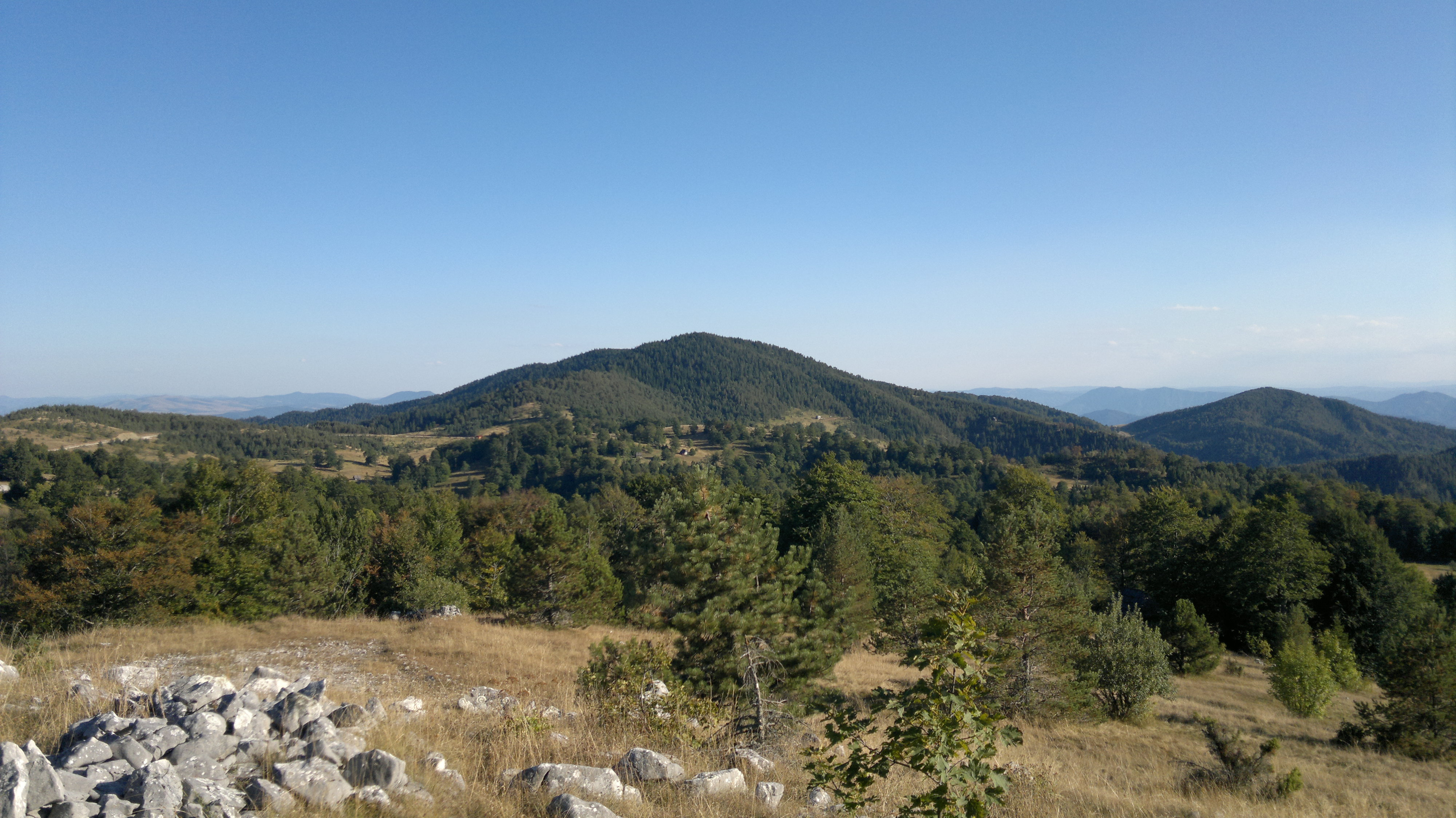 Pogled na Zborište, vrh Tare